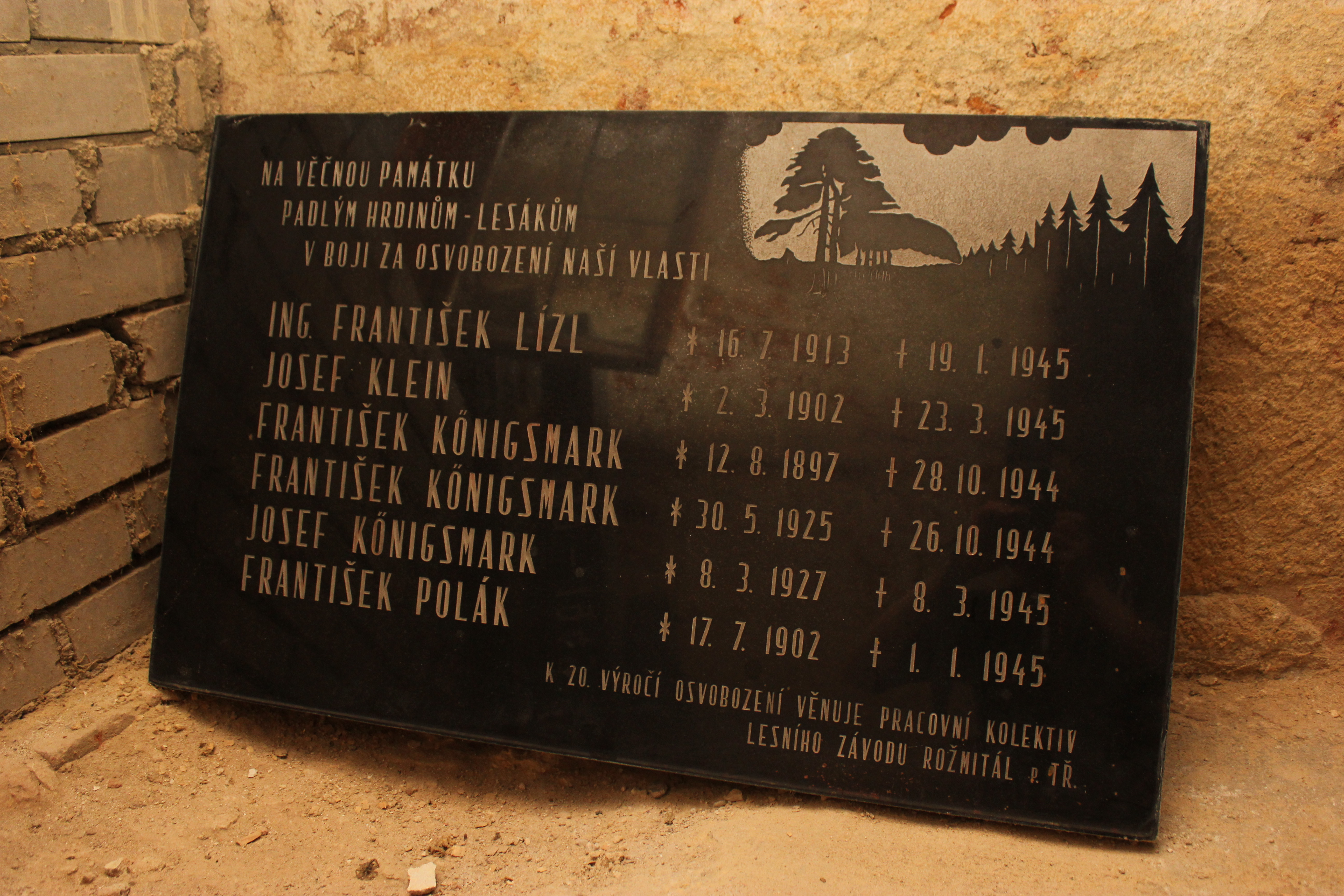 Deska byla původně umístěna na zdi Malého paláce na zámku Rožmitál, kde do 70. let 20. století sídlil Lesní závod. Během rekonstrukcí, které nebyly dokončeny zůstala uložena v zámku.